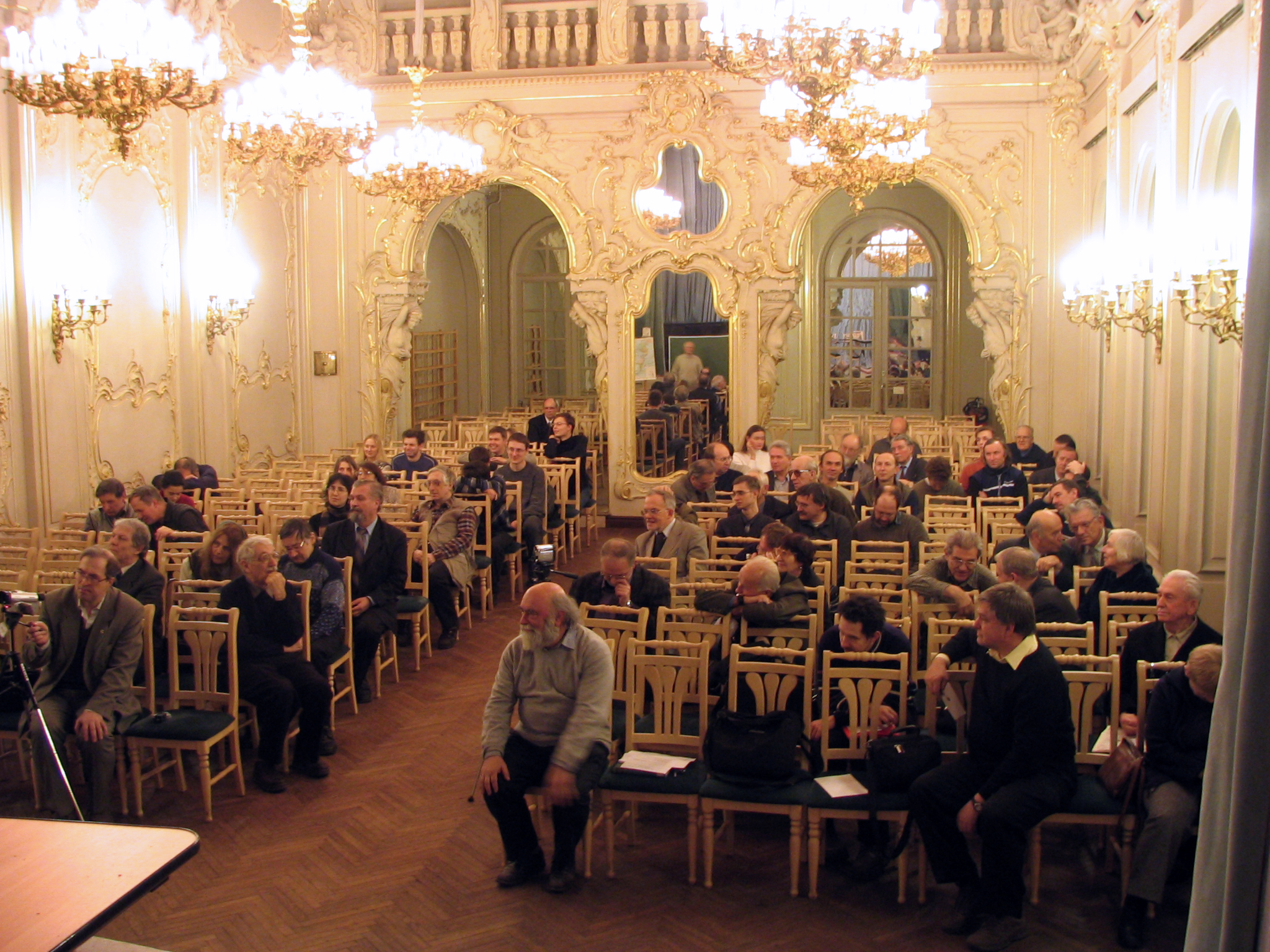 Заседание СПбМО в Доме Ученых